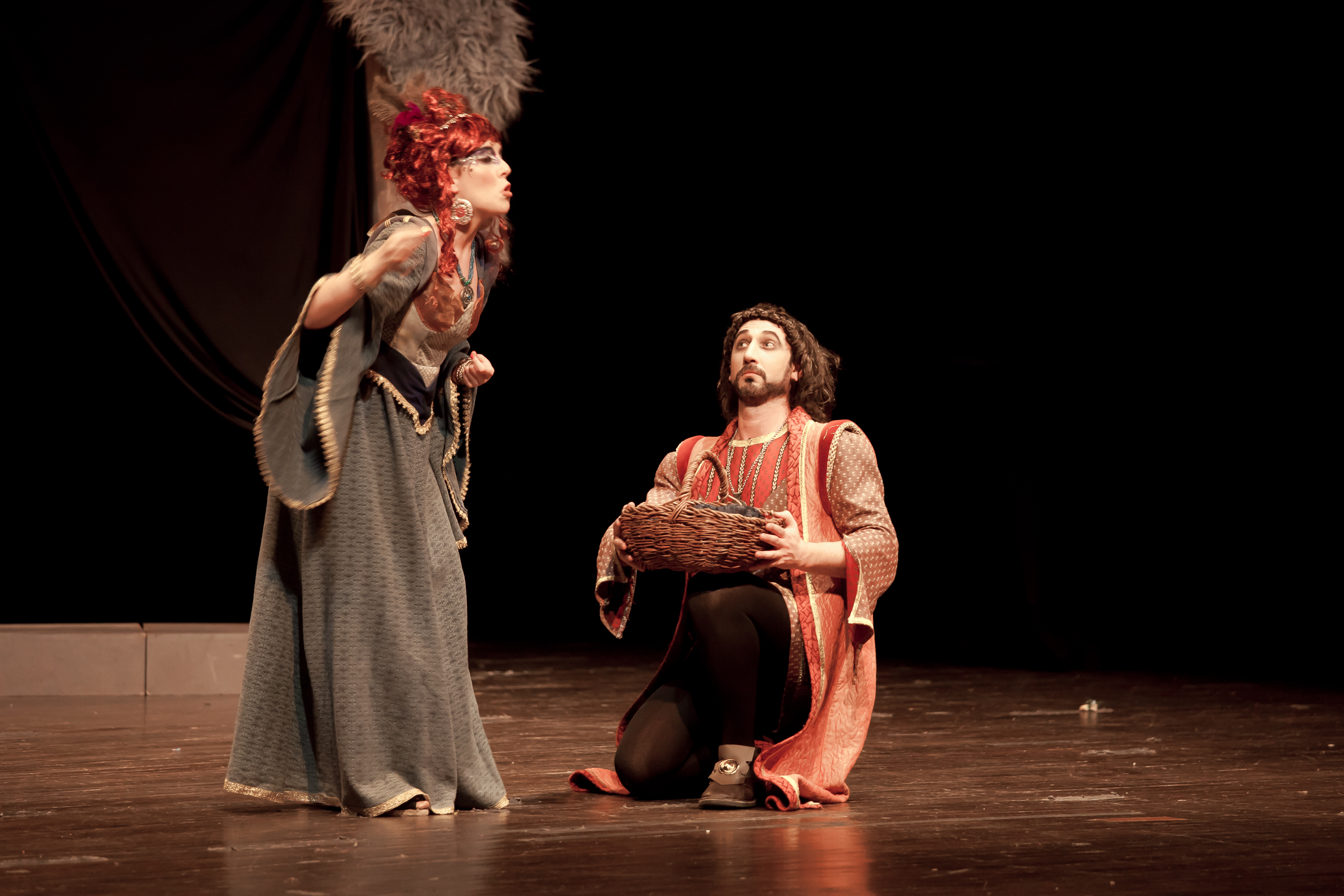 Festival de Lugo 2011 organizado por SEECGalicia. Grupo S.V. Producciones de Madrid, dirixido por Susana Verdú. © Dominio público sen restricións (Autor: Luis Miguel Bugallo Sánchez)